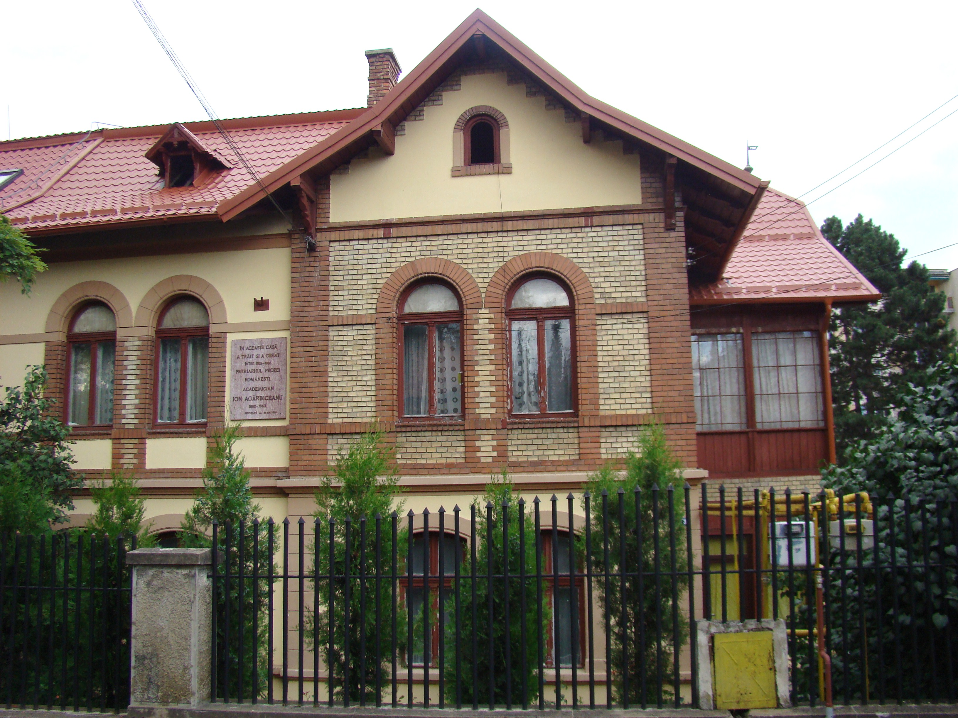 Clădire monument istoric, str.Andrei Mureșanu, nr.31 (Casa în care a trăit Ion Agârbiceanu)